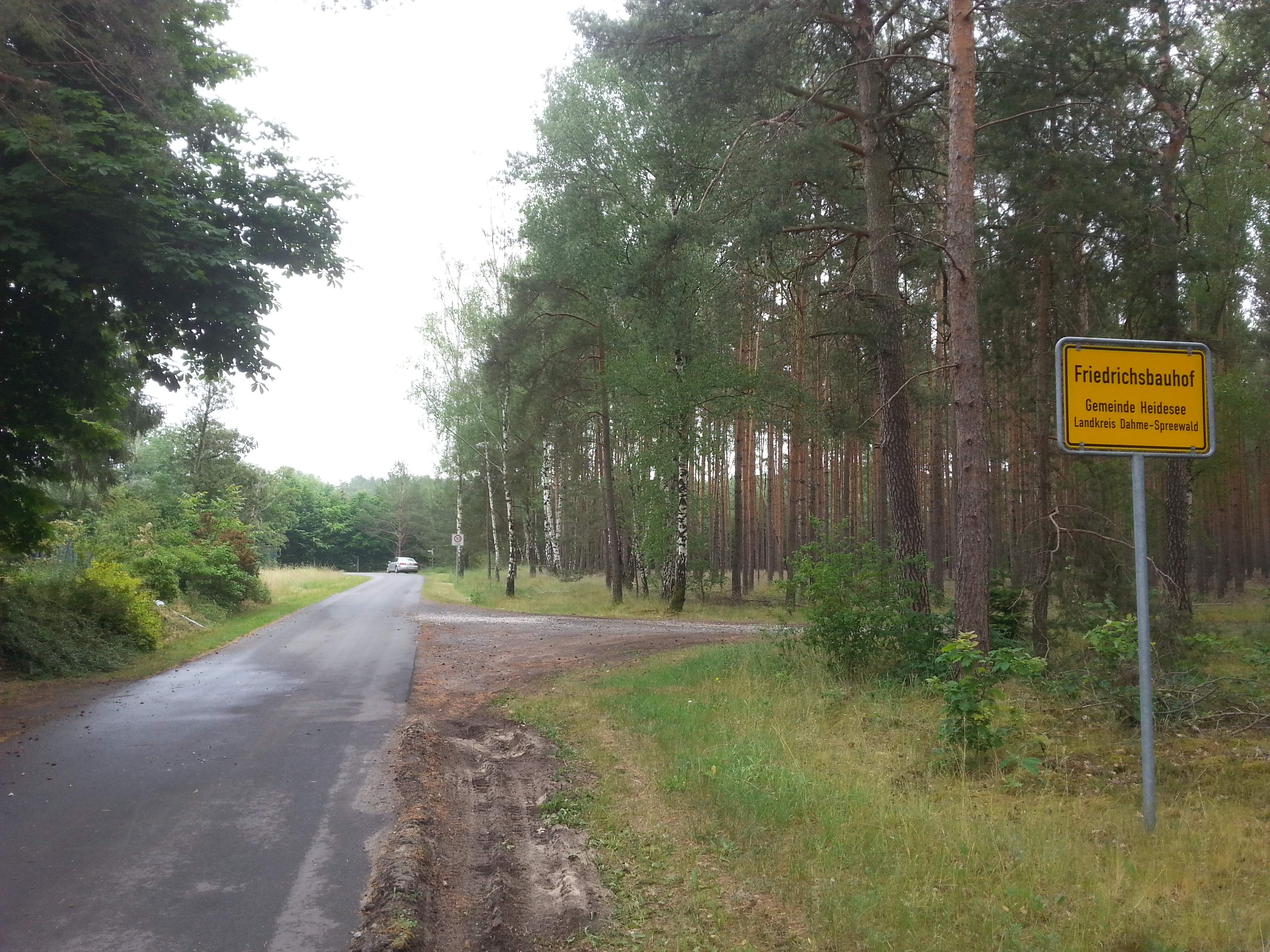 Friedrichsbauhof, Ortseingang